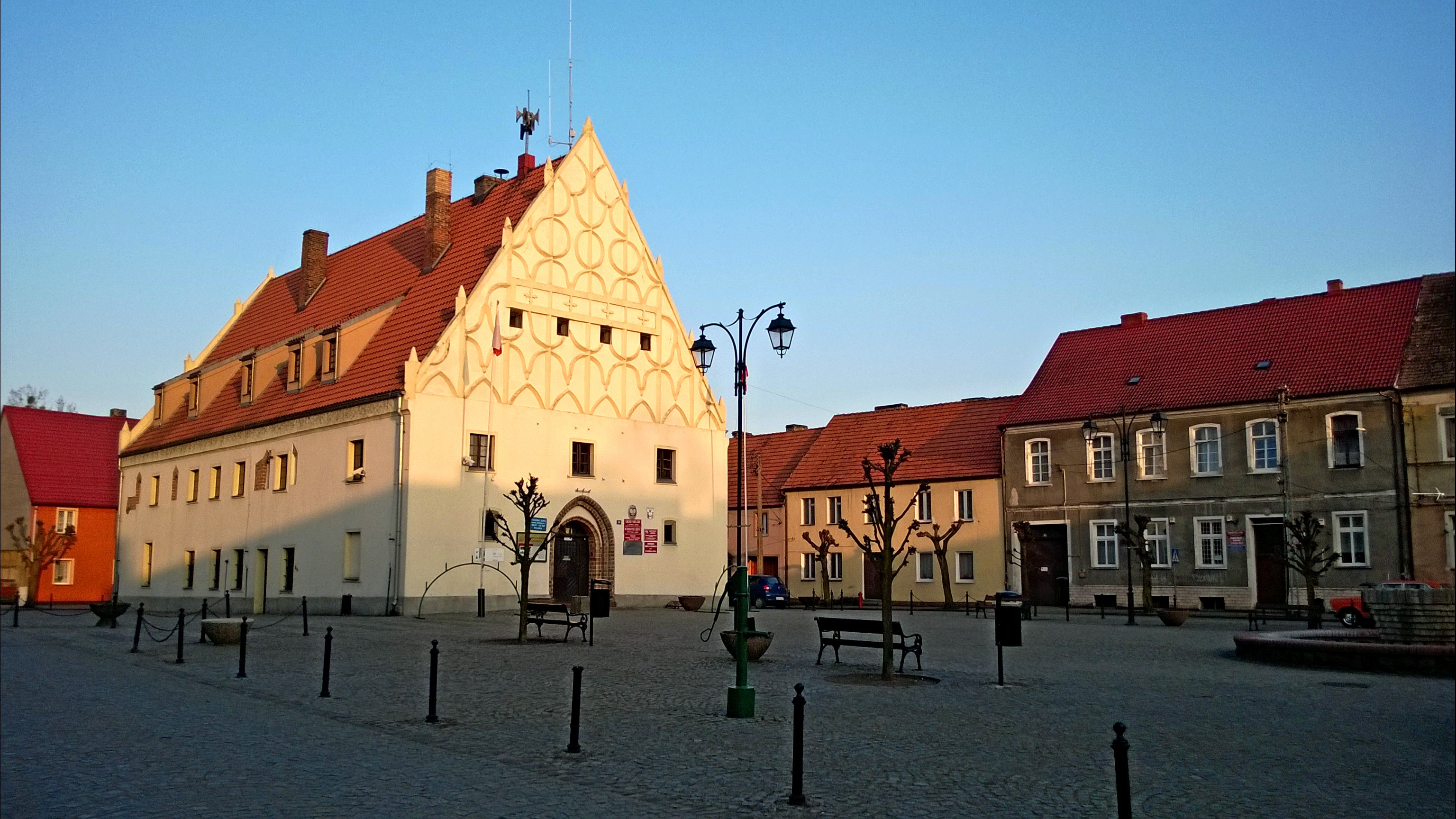 Trzcińsko Zdrój